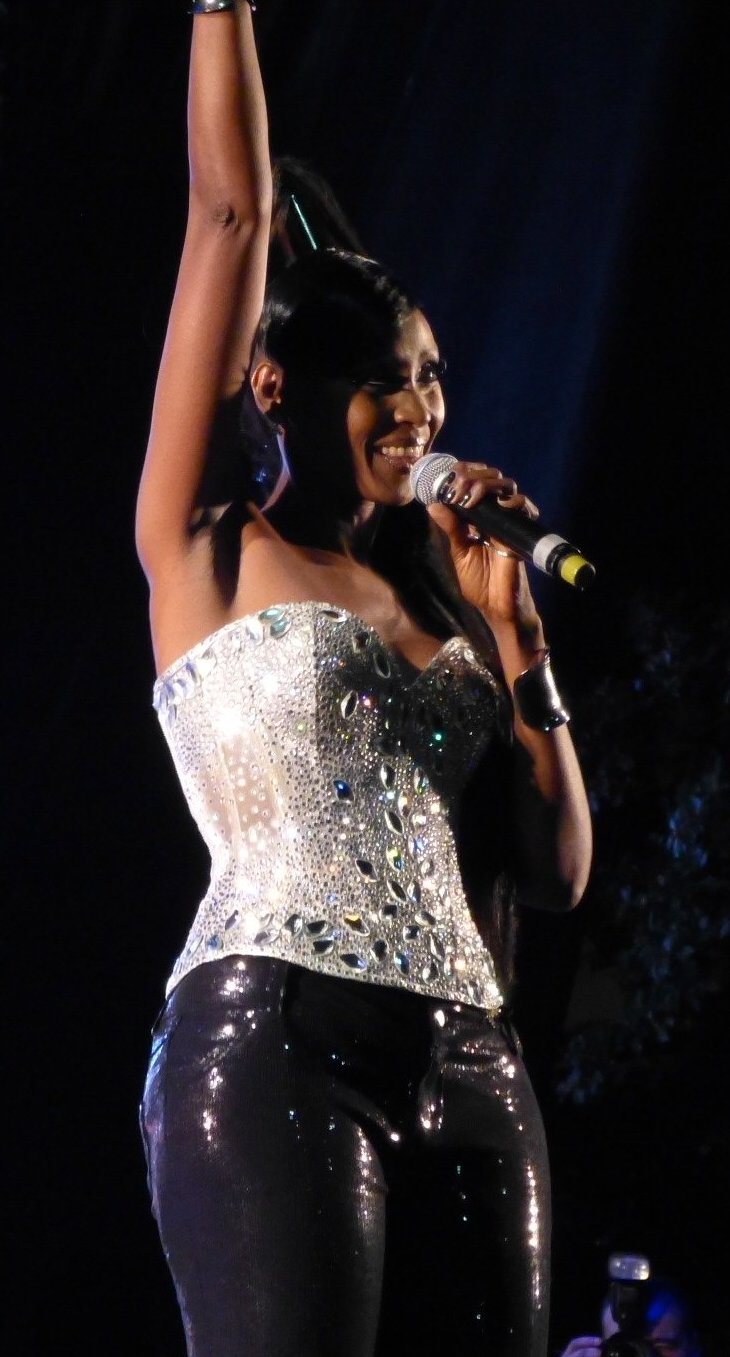 Vale do Anhangabaú - 30/05/2013